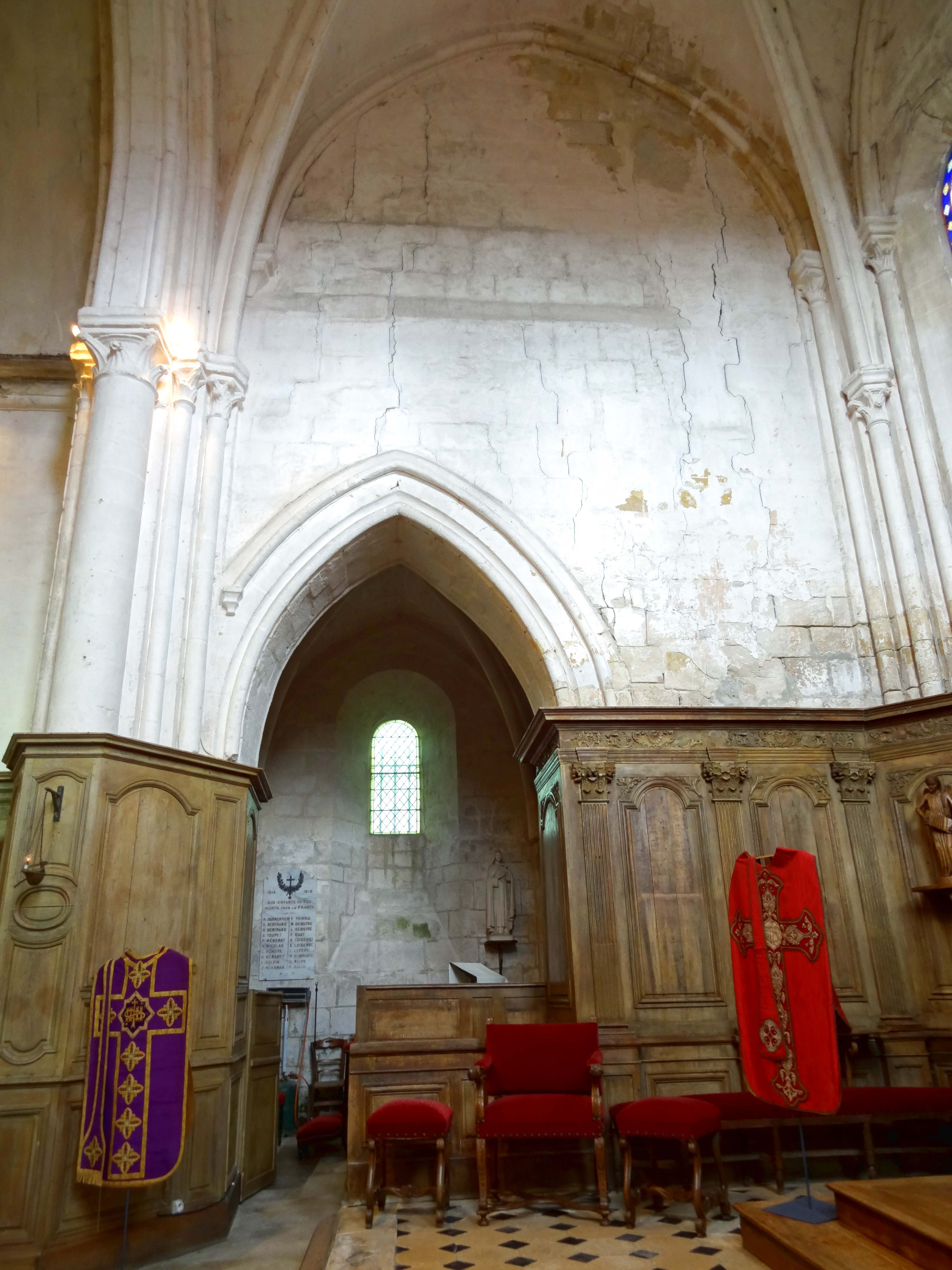 Intérieur de l'église - voir titre.